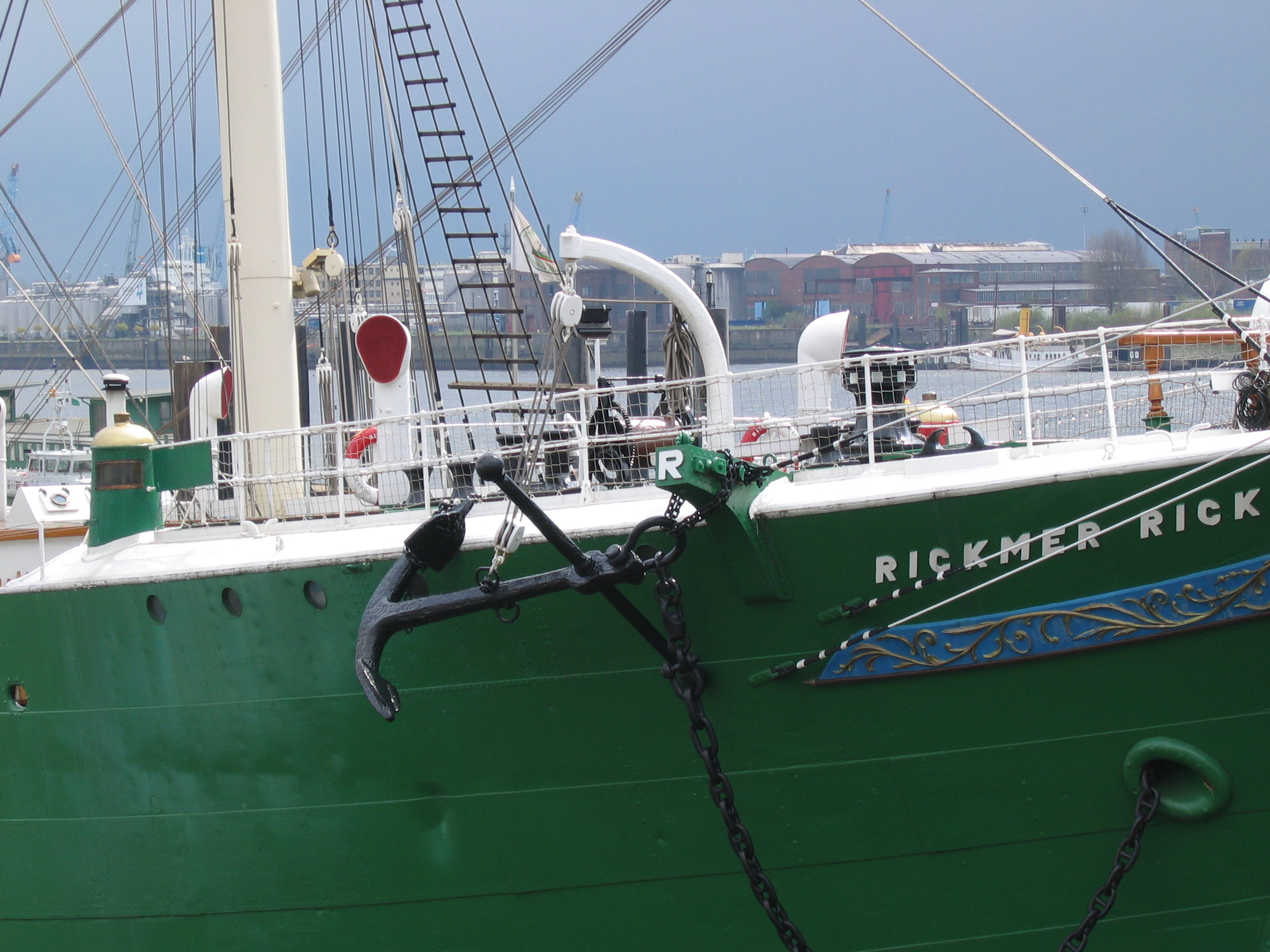 Żurawik na statku muzeum Rickmer Rick w porcie Hamburg